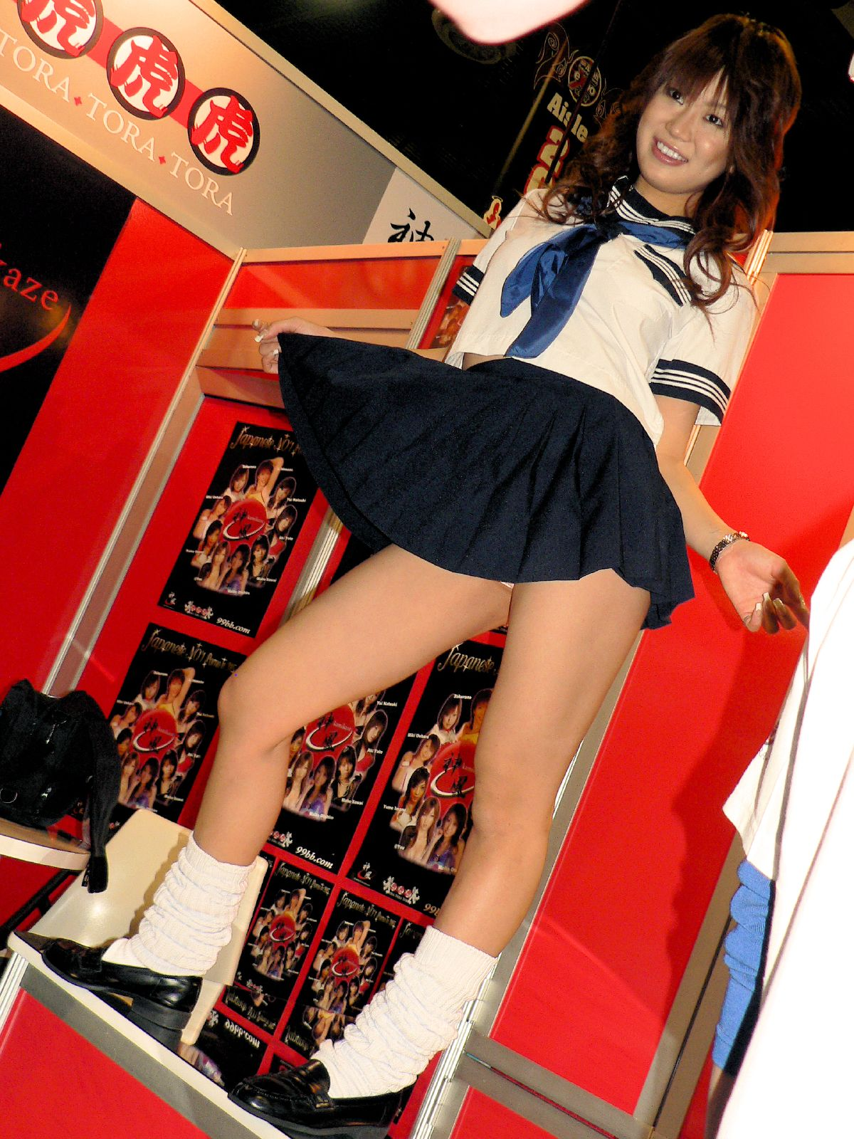 Sailor fuku model